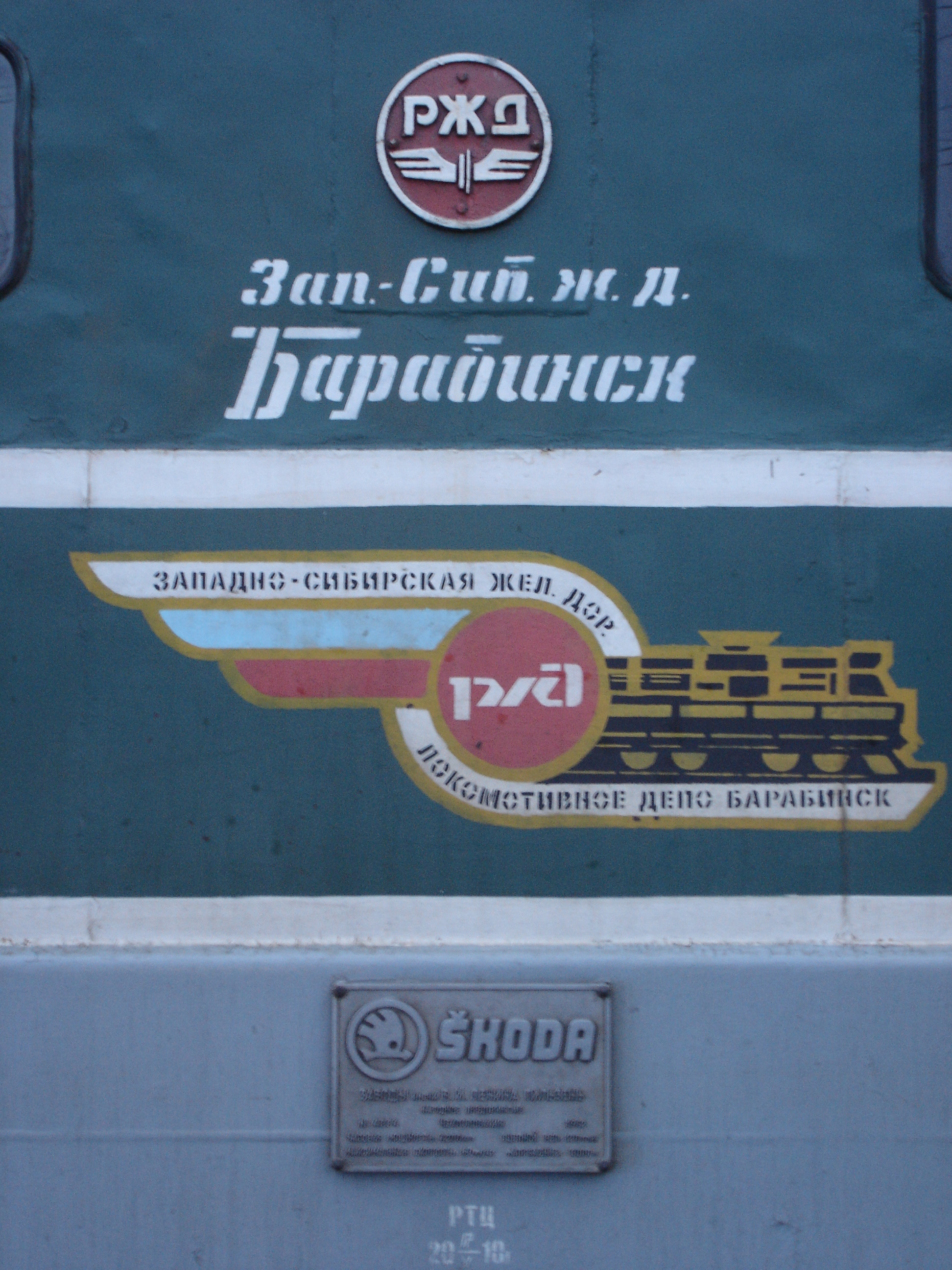 Электровоз ЧС2-266 на железнодорожом вокзале Тюмени. Некоторые внешние обозначения на борту электровоза.